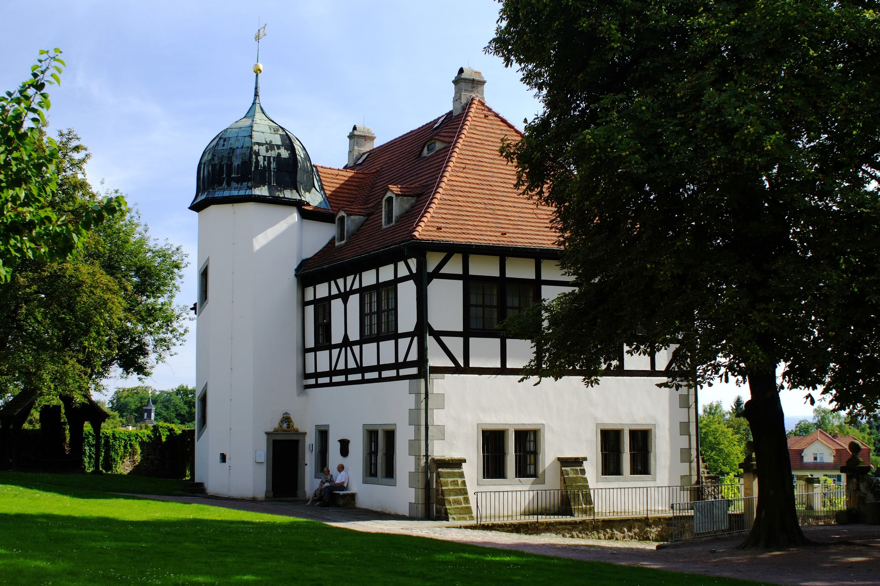 Radebeul, Berg- und Lusthaus Hoflößnitz im Ortsteil Oberlößnitz